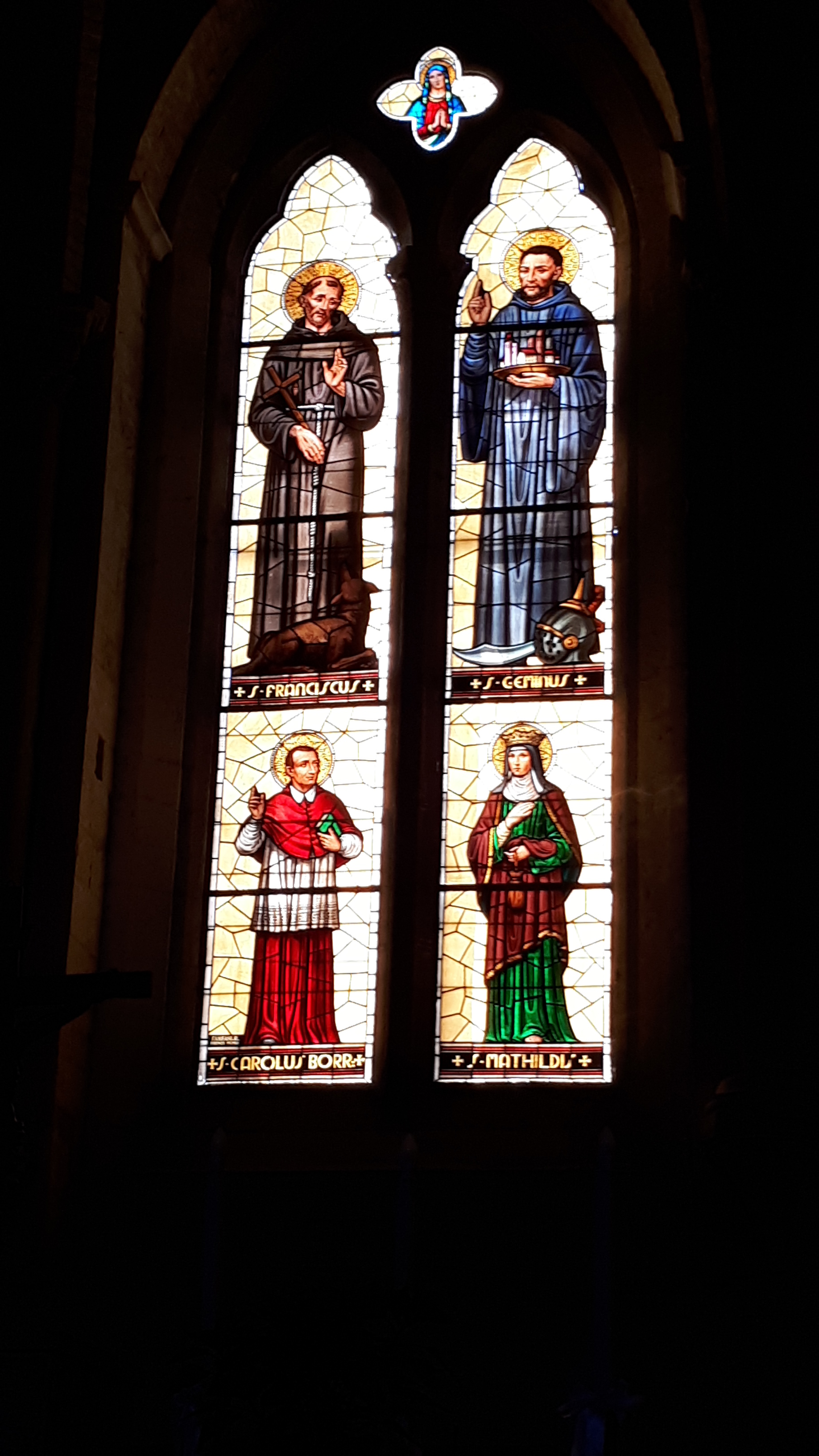 Raffigurazione di San Gemini